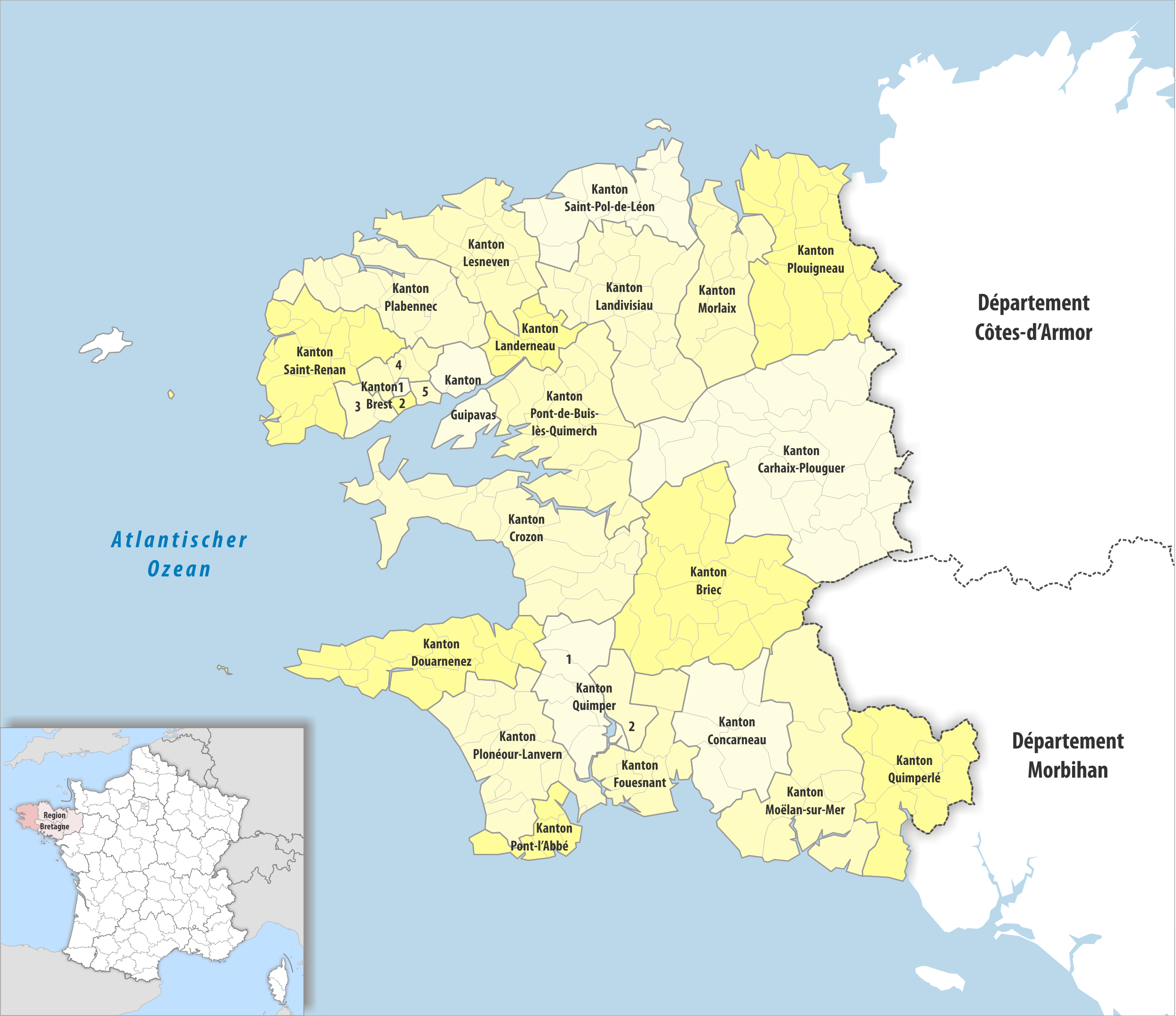 Gemeinden und Kantone im Departement Finistère